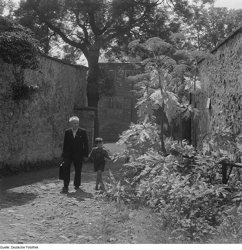 Original image description from the Deutsche Fotothek Mann mit einem Jungen an der Hand auf einem Weg zwischen hohen Steinmauern